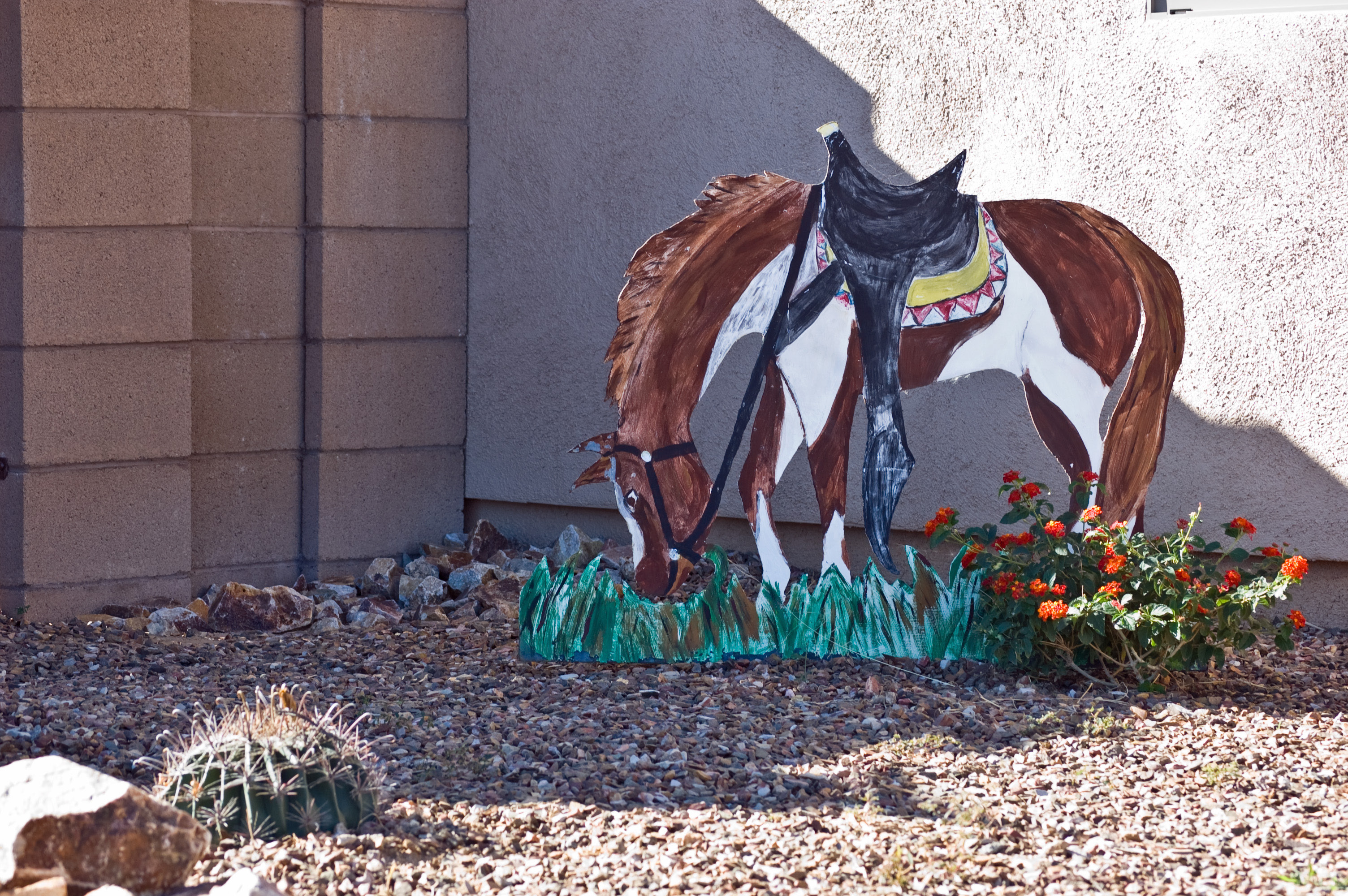 Yard art, Green Valley, Arizona